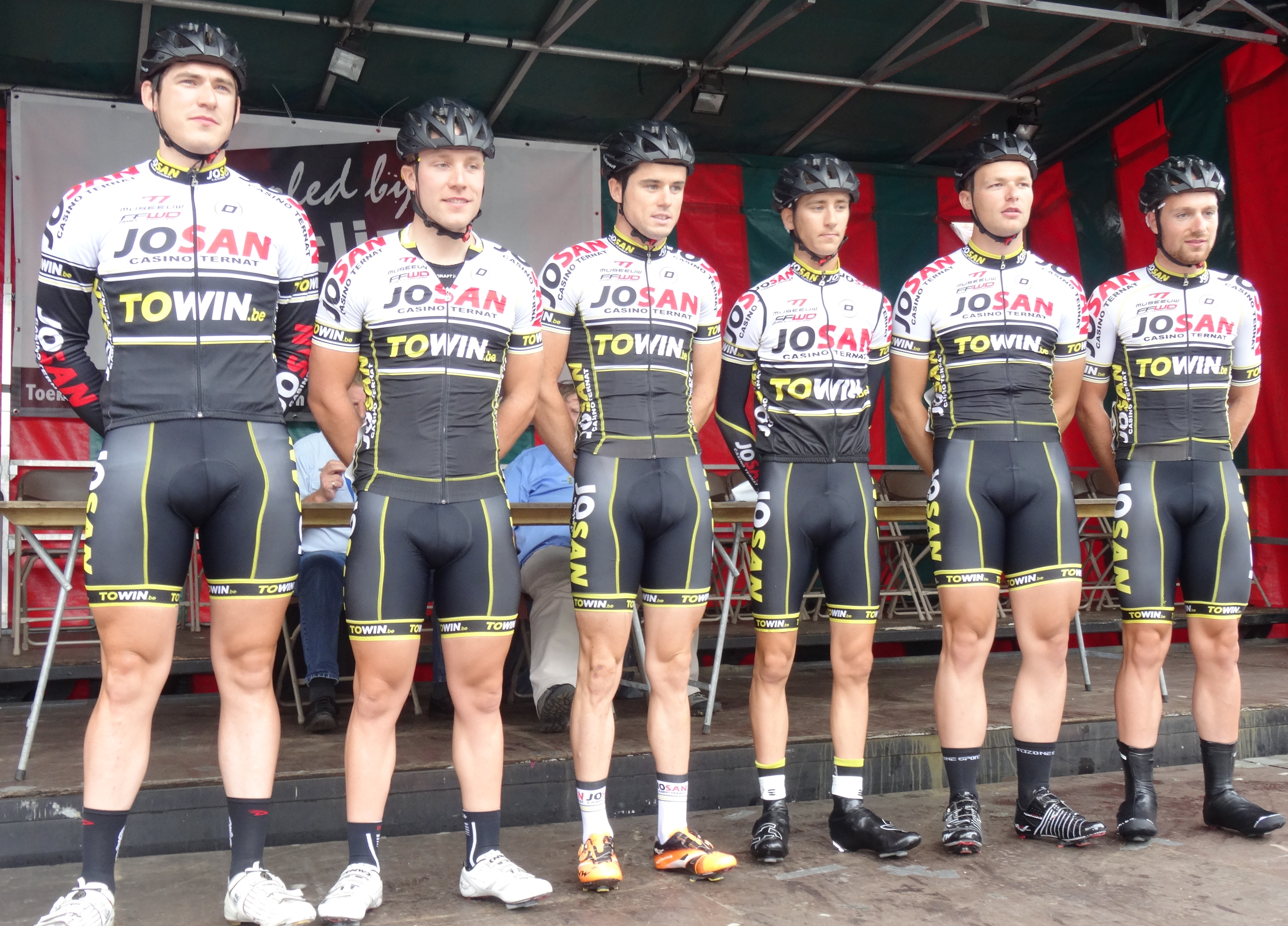 Reportage photographique réalisé le dimanche 10 août à l'occasion du départ et de l'arrivée de la Flèche du port d'Anvers 2014 à Merksem (Anvers), Belgique.